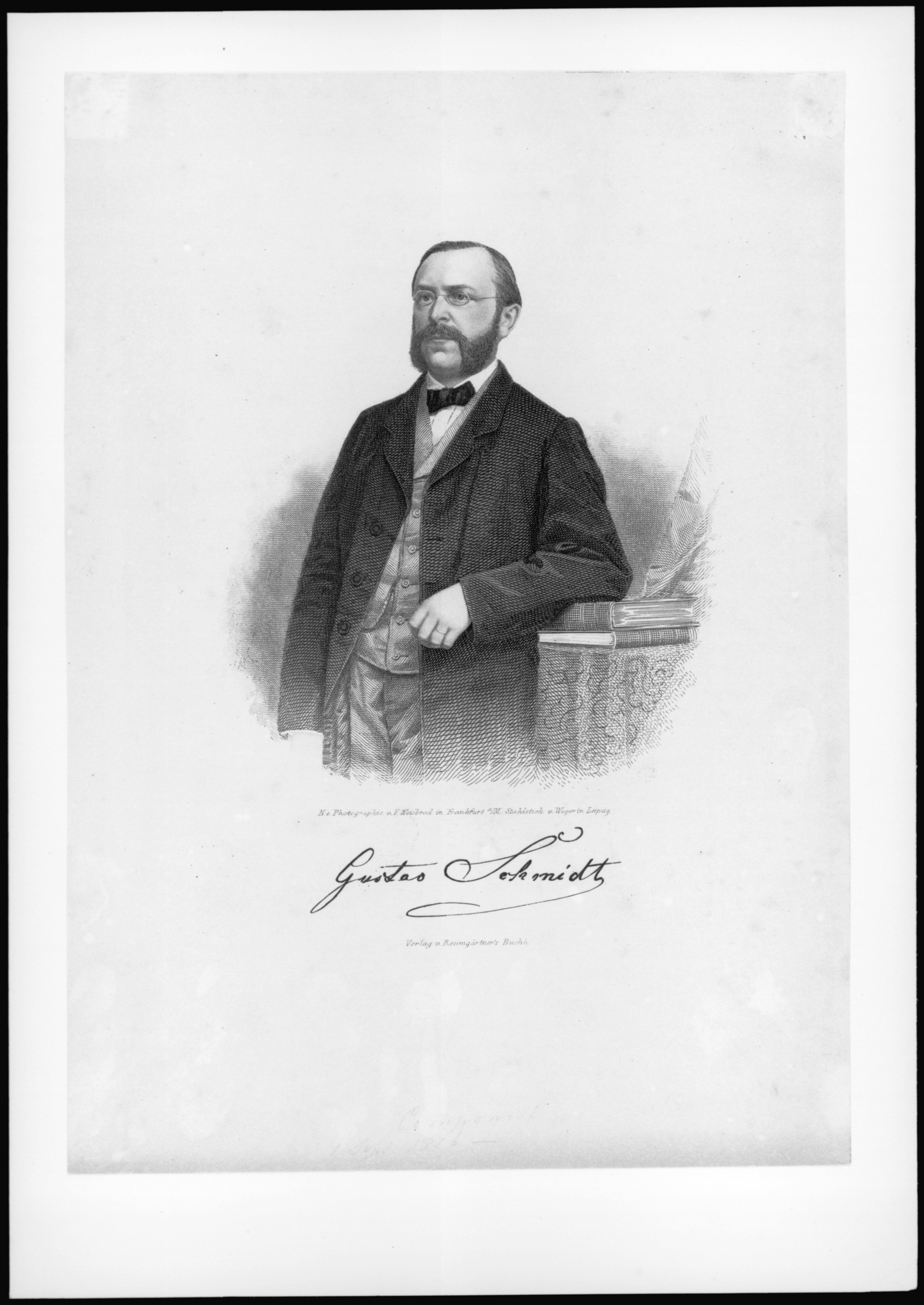 Gustav Schmidt, Kniestück